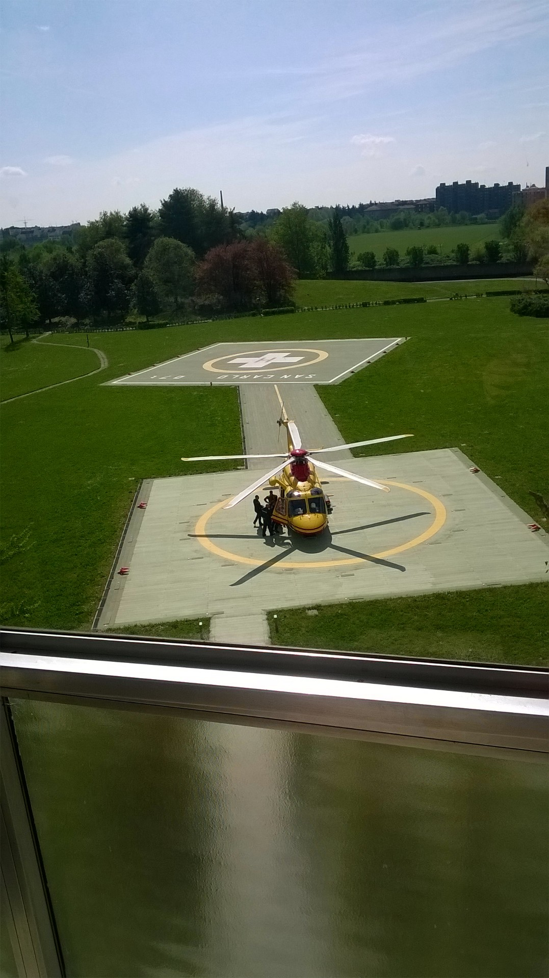 Eliporto dell'Ospedale San Carlo Borromeo di Milano con elicottero